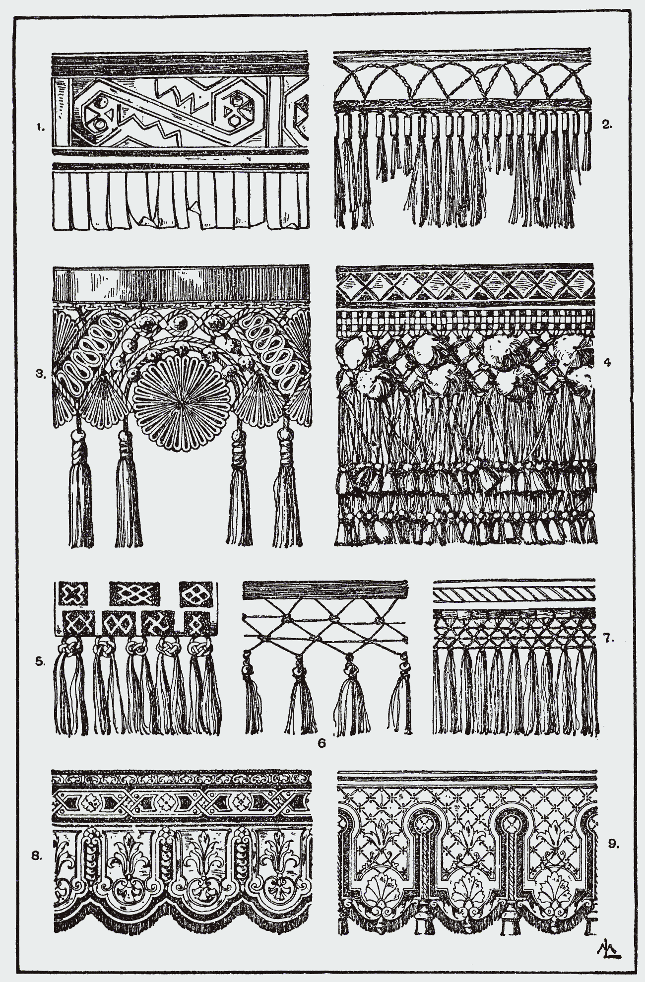 Orna119-Franzen-Lambrequins